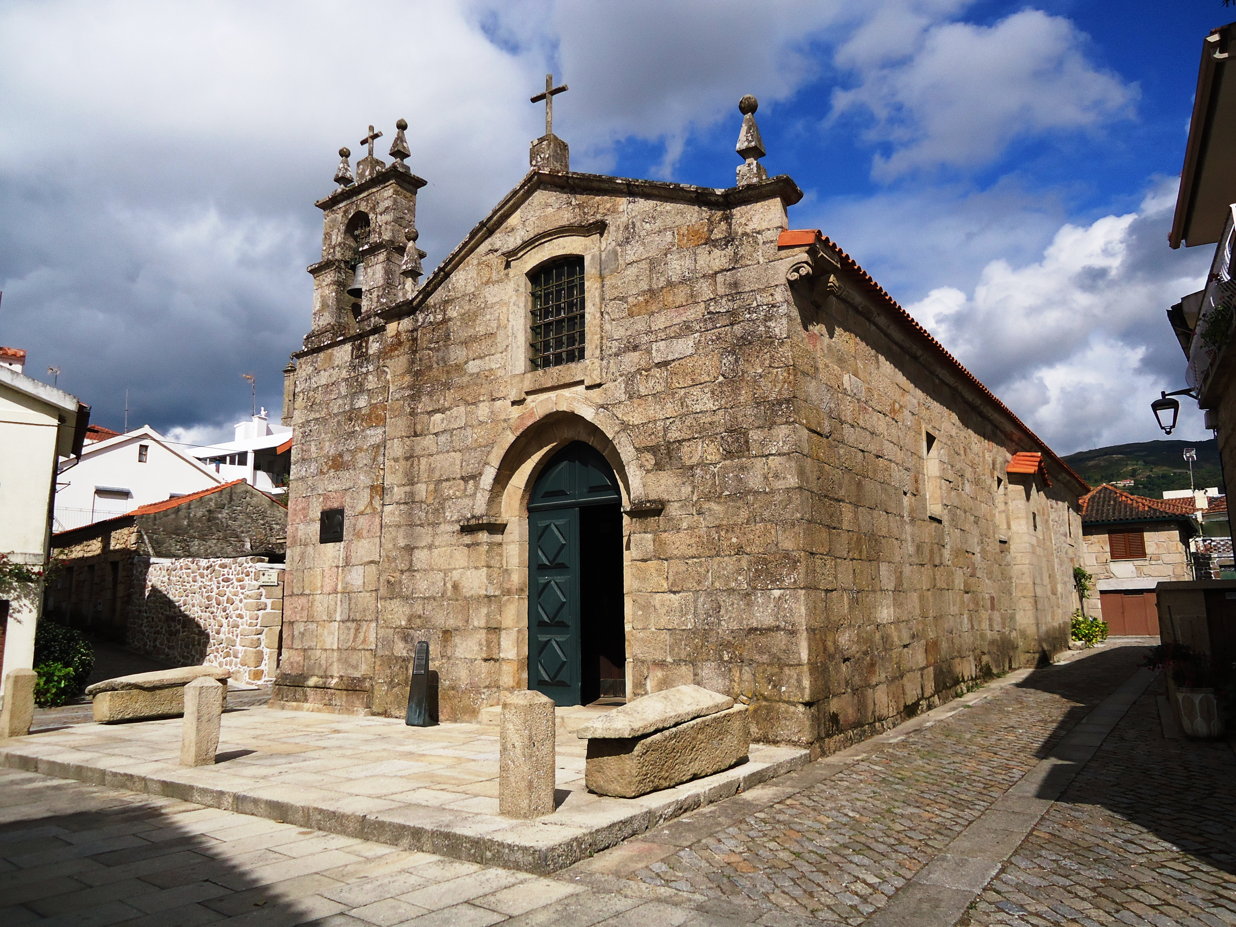 Igreja da Misericórdia, Melgaço, distrito de Viana do Castelo, Portugal.